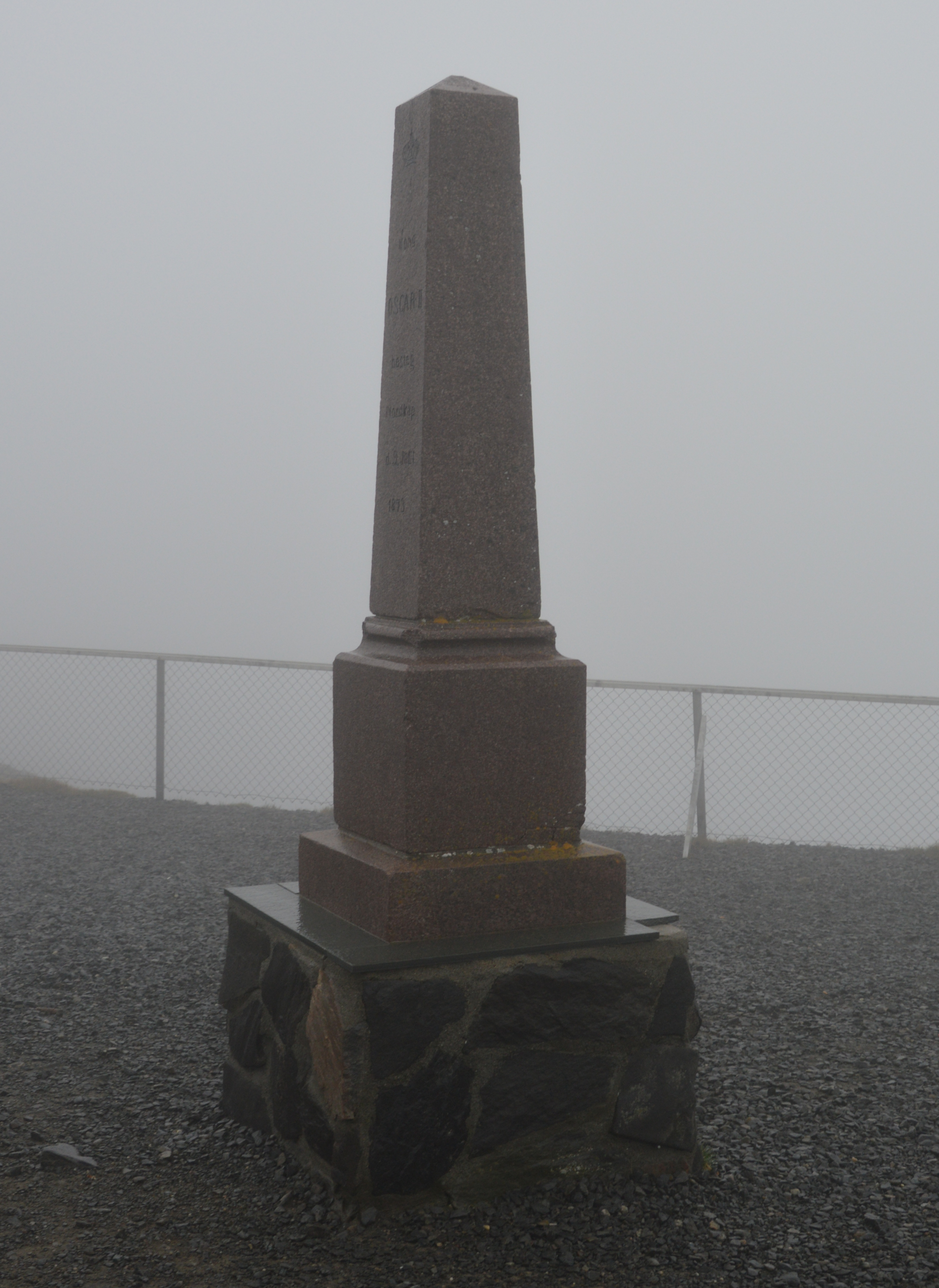 Oscarsäule